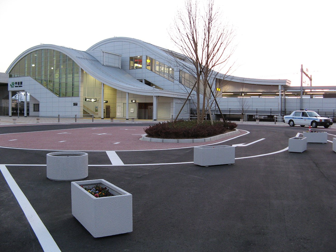 平田駅（篠ノ井線）